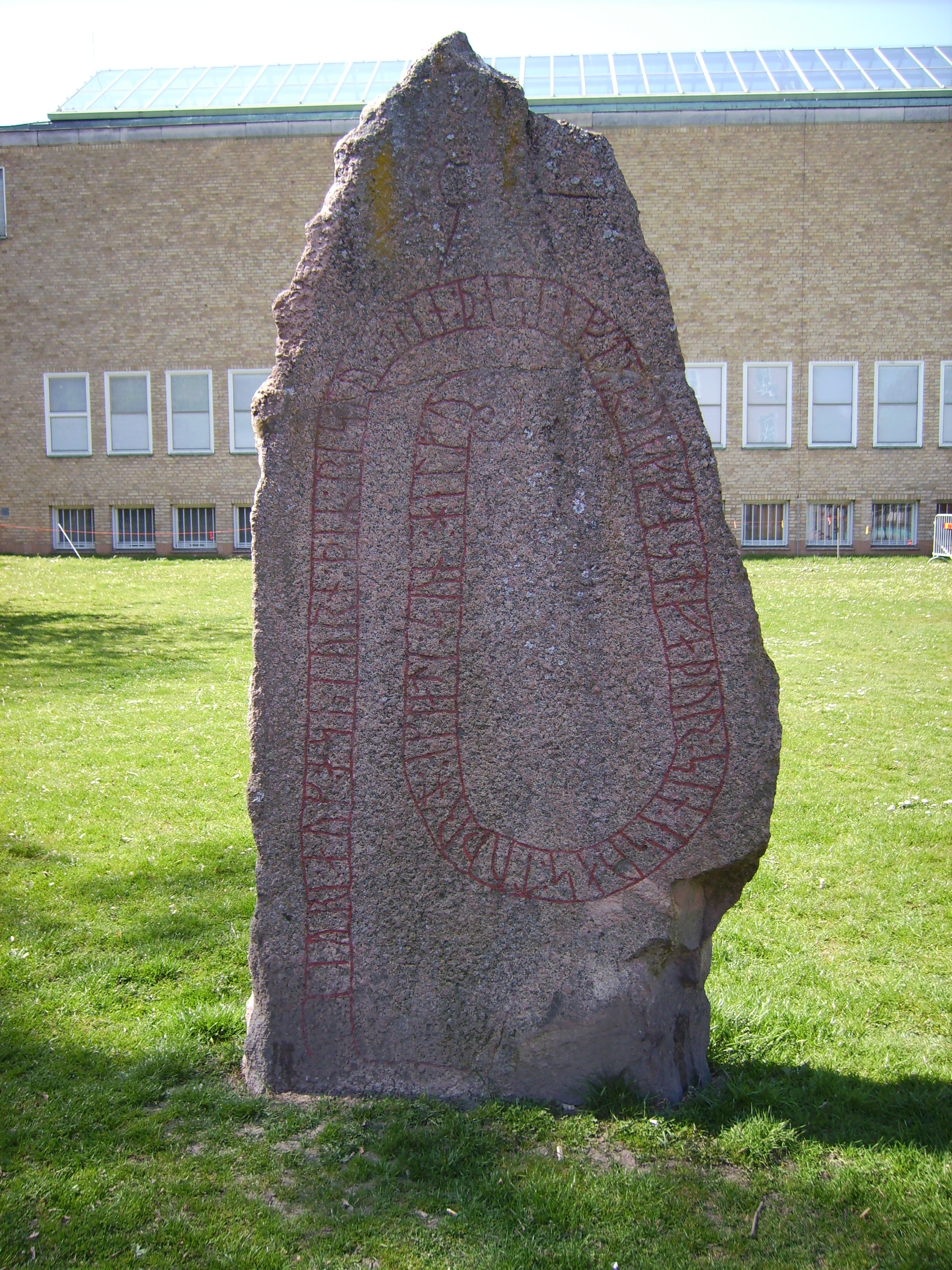 Östergötlands runinskrifter Fv1950;341 ...-iur- : auk : as-iurn : þiR : ristu : stin : þasi : eft-R : uikfast : faþur : sin : es uas : tuþr : o : eklati : sun : helgu Funnen på Kallerstads ägor, S:t Lars sn. Placering: Utanför länsmuseet, Linköping. Datering: V ca 1025